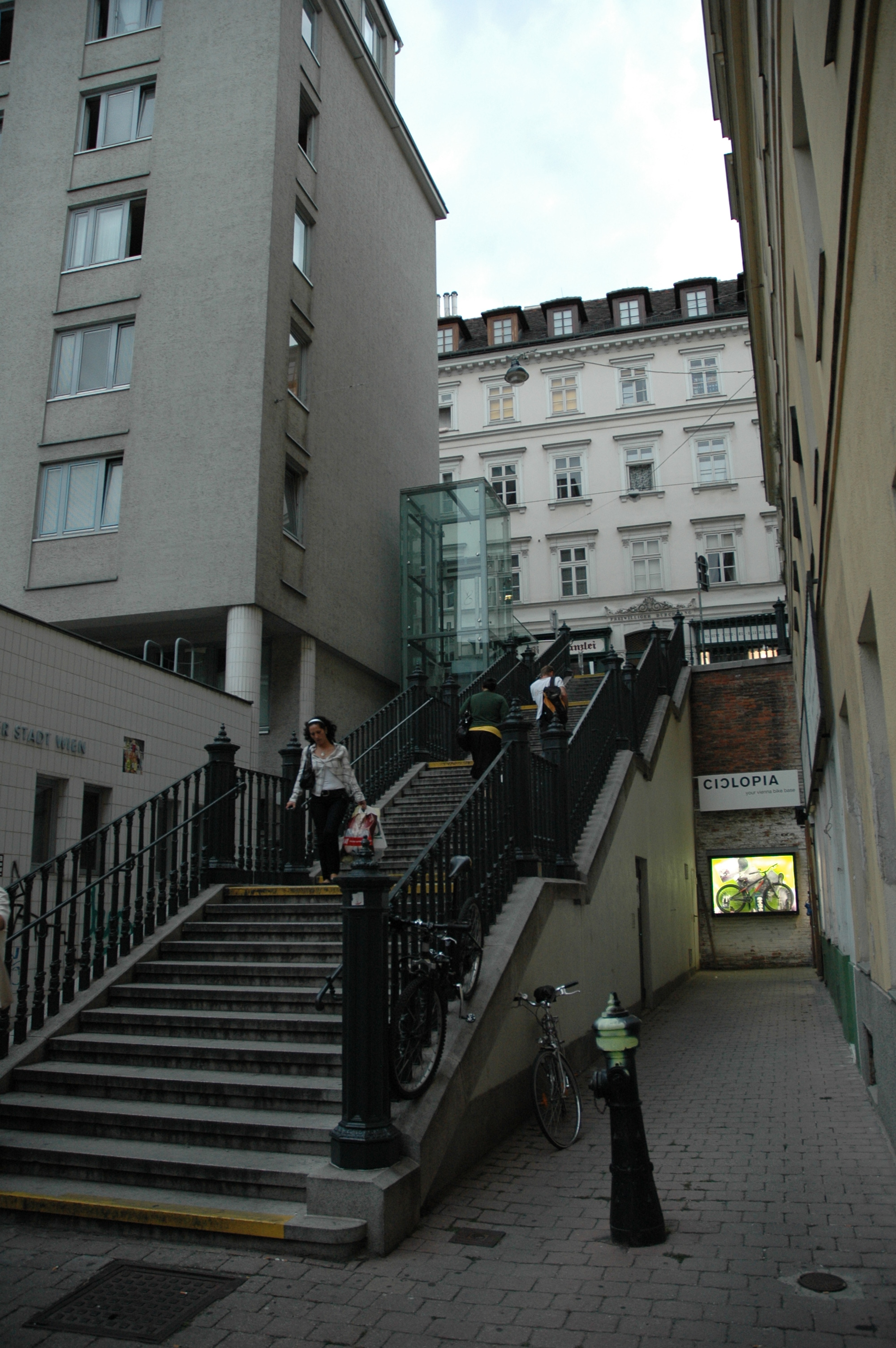 Amonstiege in Wien-Mariahilf, zwischen Gumpendorfer Straße und Windmühlgasse